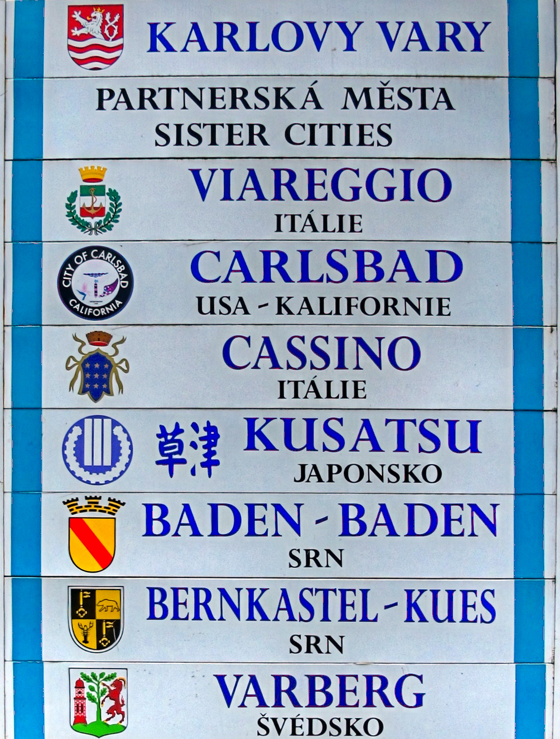 Tschechien, Karlsbad, Städtepartnerschaften